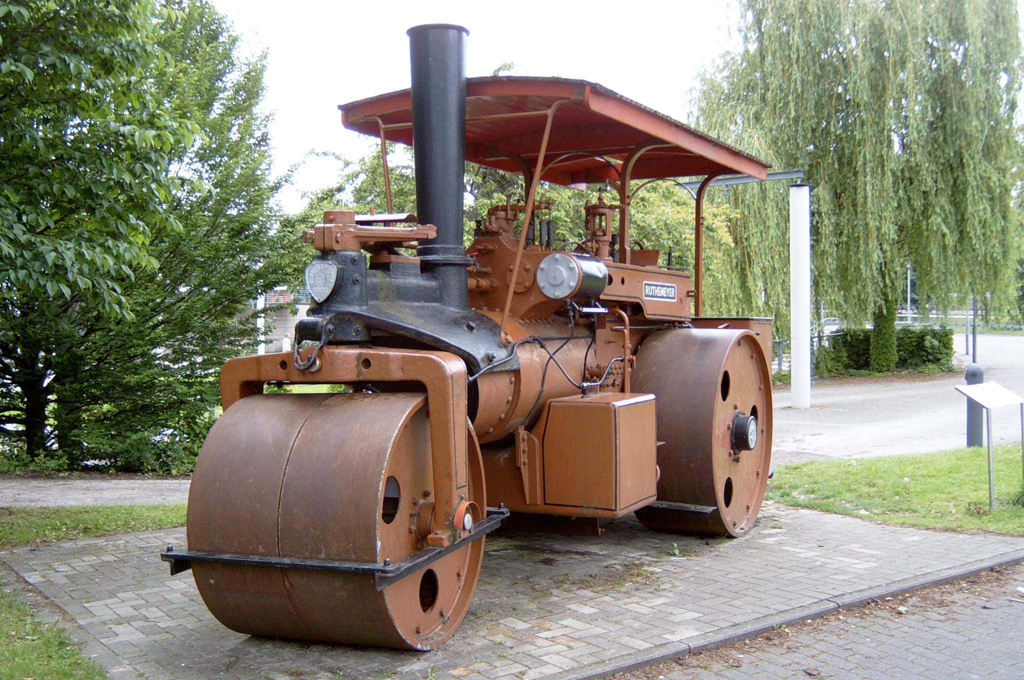 Soester Industriegeschichte (Soest/Westfalen), hier Walzenfabrik Bernhard Ruthemeier und Hermann Milke Strassenbau, „Walzendenkmal“ am alten Werksstandort Fa. Ruthemeier in der Nähe des alten Nöttentores, heute Standort der Stadthalle, unmittelbar am Ulrichertor